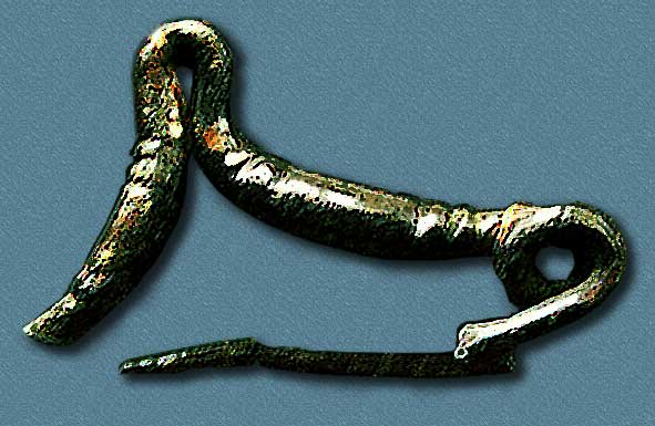 Fíbula de bronce «de Codo» procedente de la inhumación de San Román de Hornija, provincia de Valladolid (Bronce final, Cultura de Cogotas-I, 1100-800 a. C.). Se conserva en el Museo Arqueológico de Valladolid